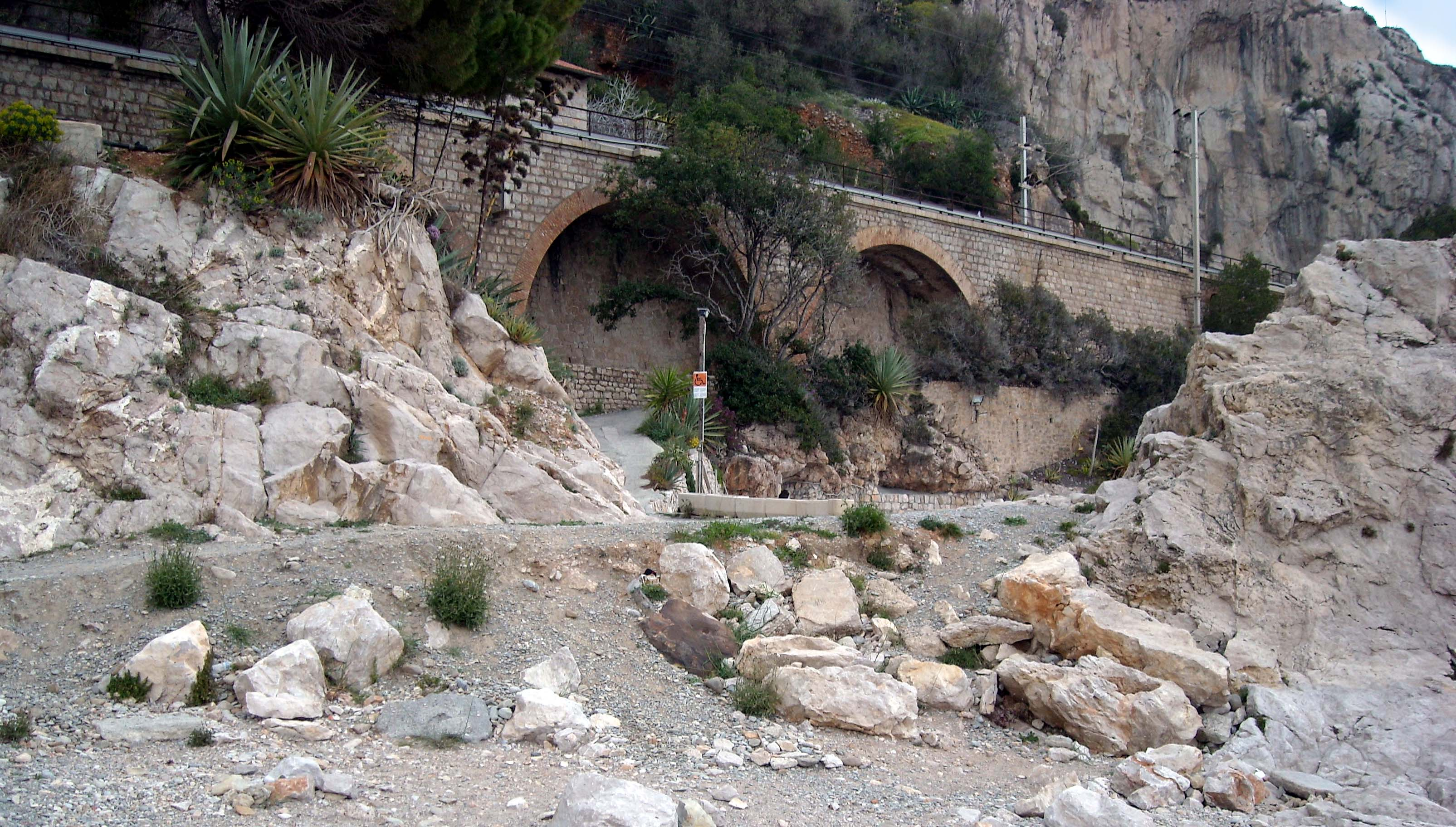 La "tagliata" della via Julia Augusta ai Balzi Rossi di Ventimiglia.